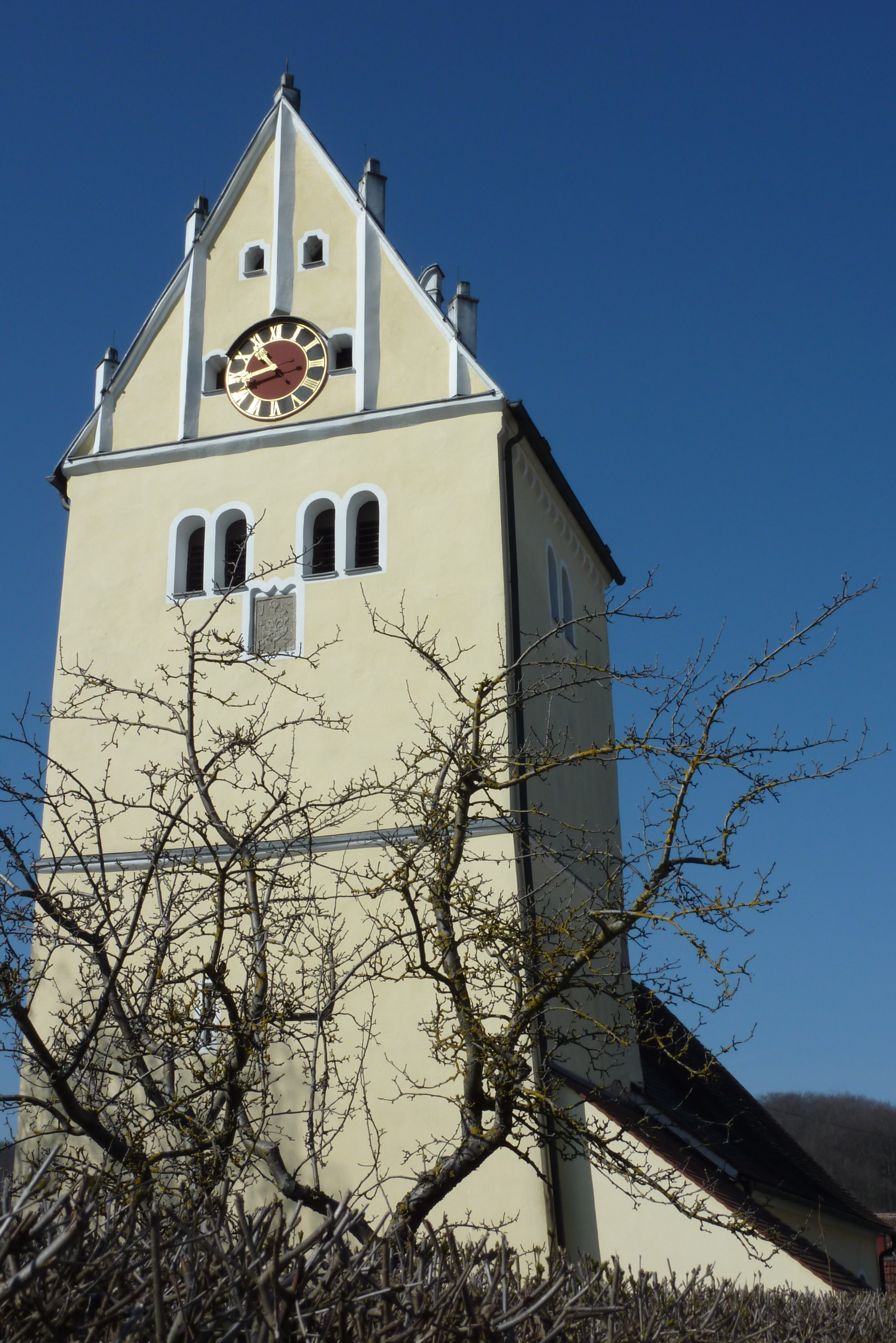 Untermagerbein, evangelische Kirche St. Nikolaus, romanischer Glockenturm